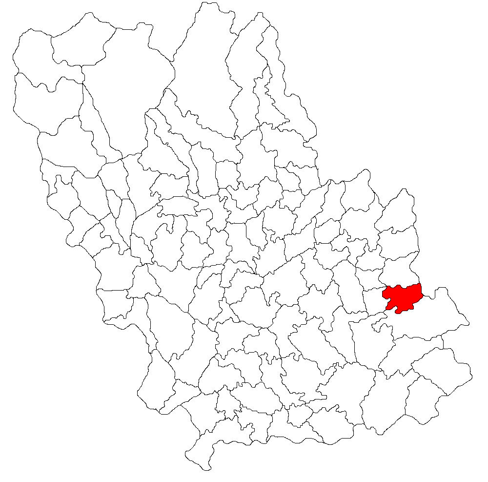 Categorie:Hărţi ale judeţului Prahova